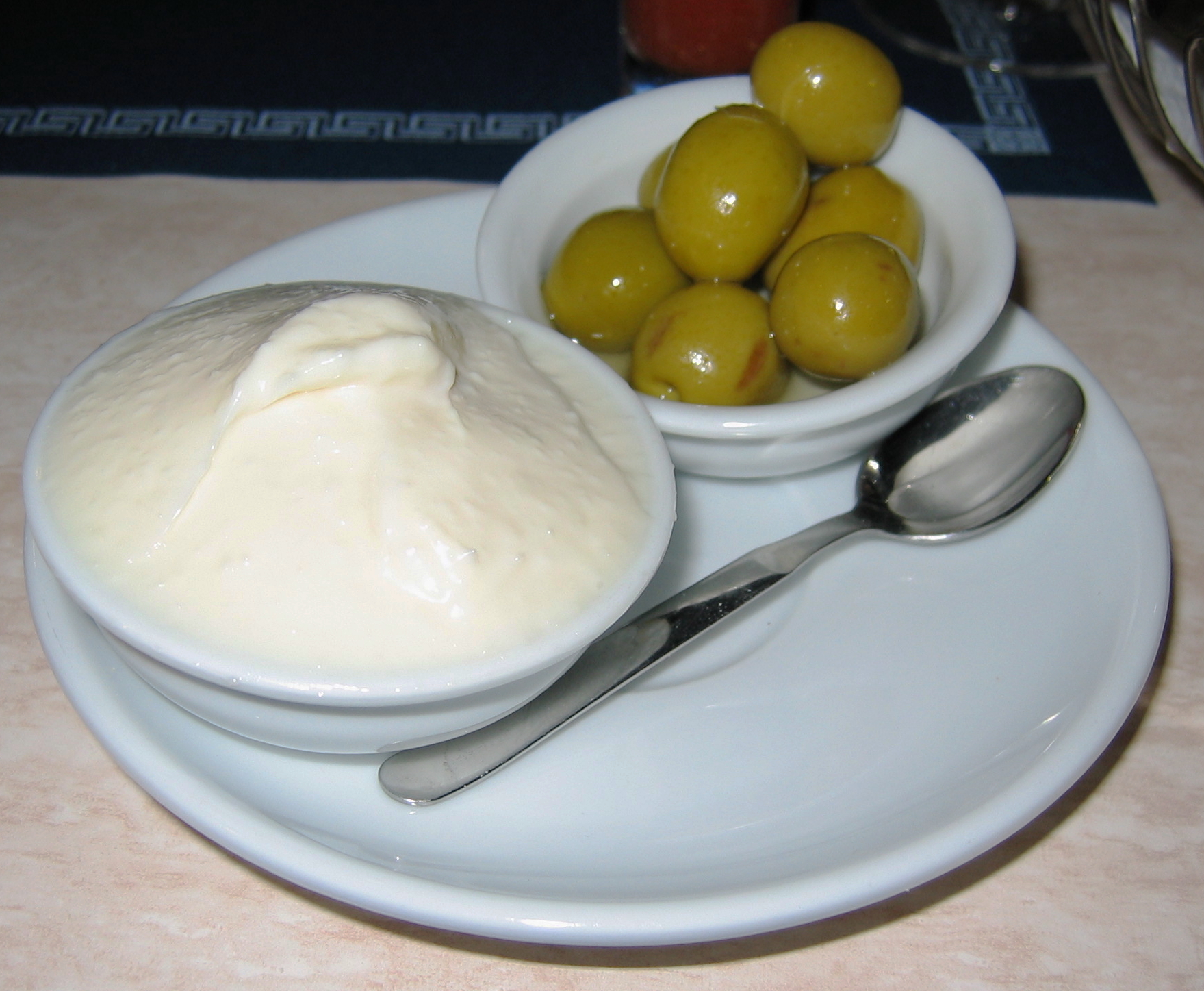 Aioli